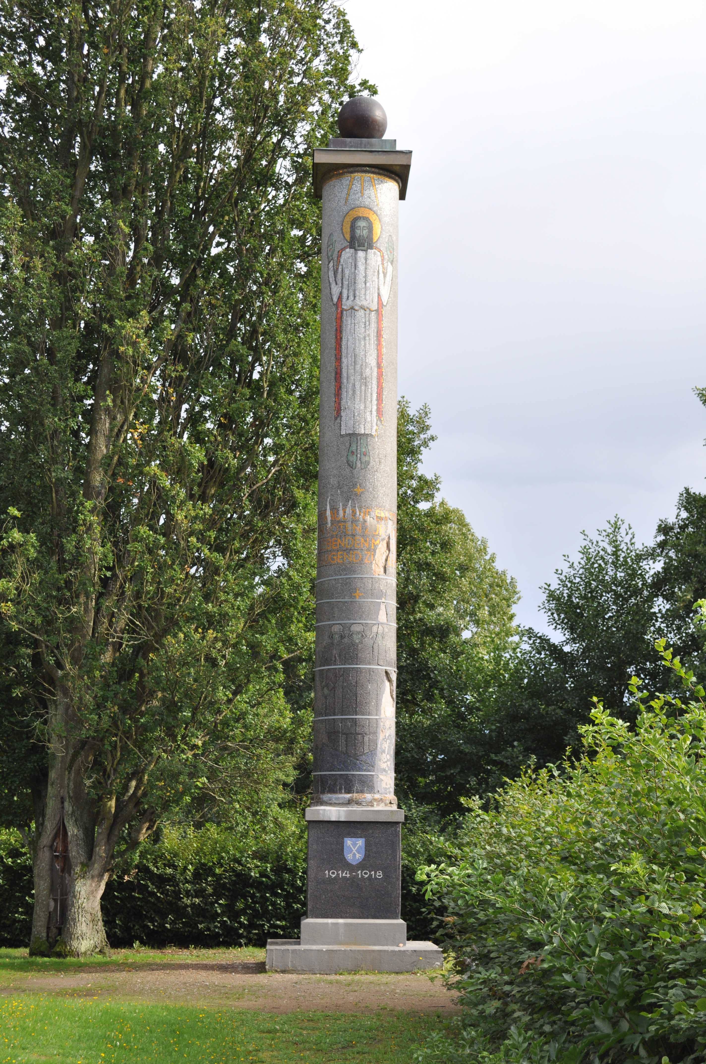 Ehrenmal für die Gefallenen des Ersten Weltkriegs von Lina von Schauroth (1875-1970) in Oberursel neben der Christuskirche